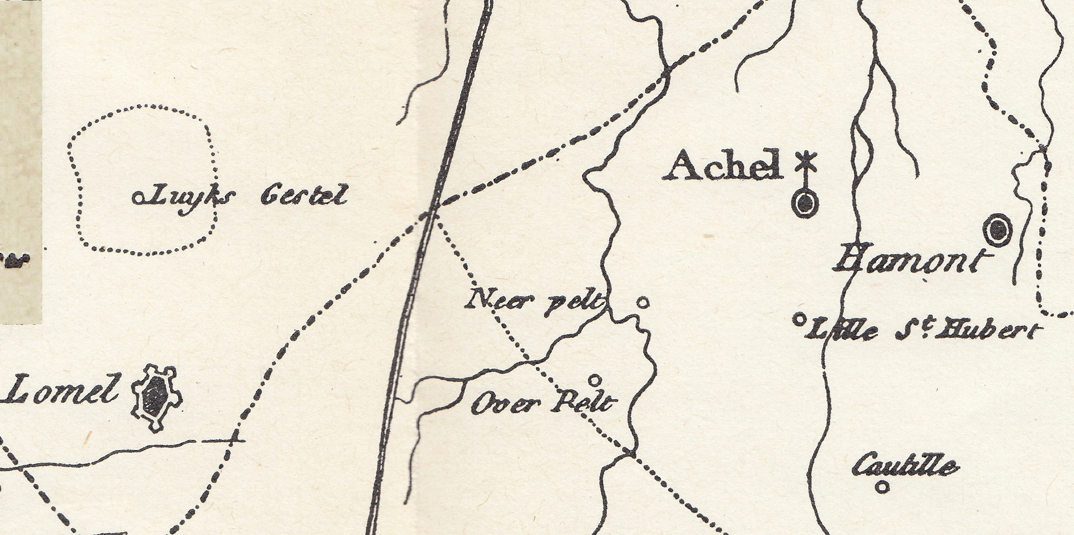 Detail van een oude Franse kaart van het departement Nedermaas (département de la Meuse-Inférieure). De departementsgrenzen zijn aangegeven met stippel-streeplijnen; de arrondissementsgrenzen met stippellijnen. Hier een deel van de arrondissement Hasselt en Roermond. Luiks-Gestel was een enclave van Nedermaas in de Bataafse Republiek/Koninkrijk Holland, maar behoorde tot het arrondissement Roermond, kanton Achel. In 1808 werd een deel van Luyksgestel geruild tegen Lommel.